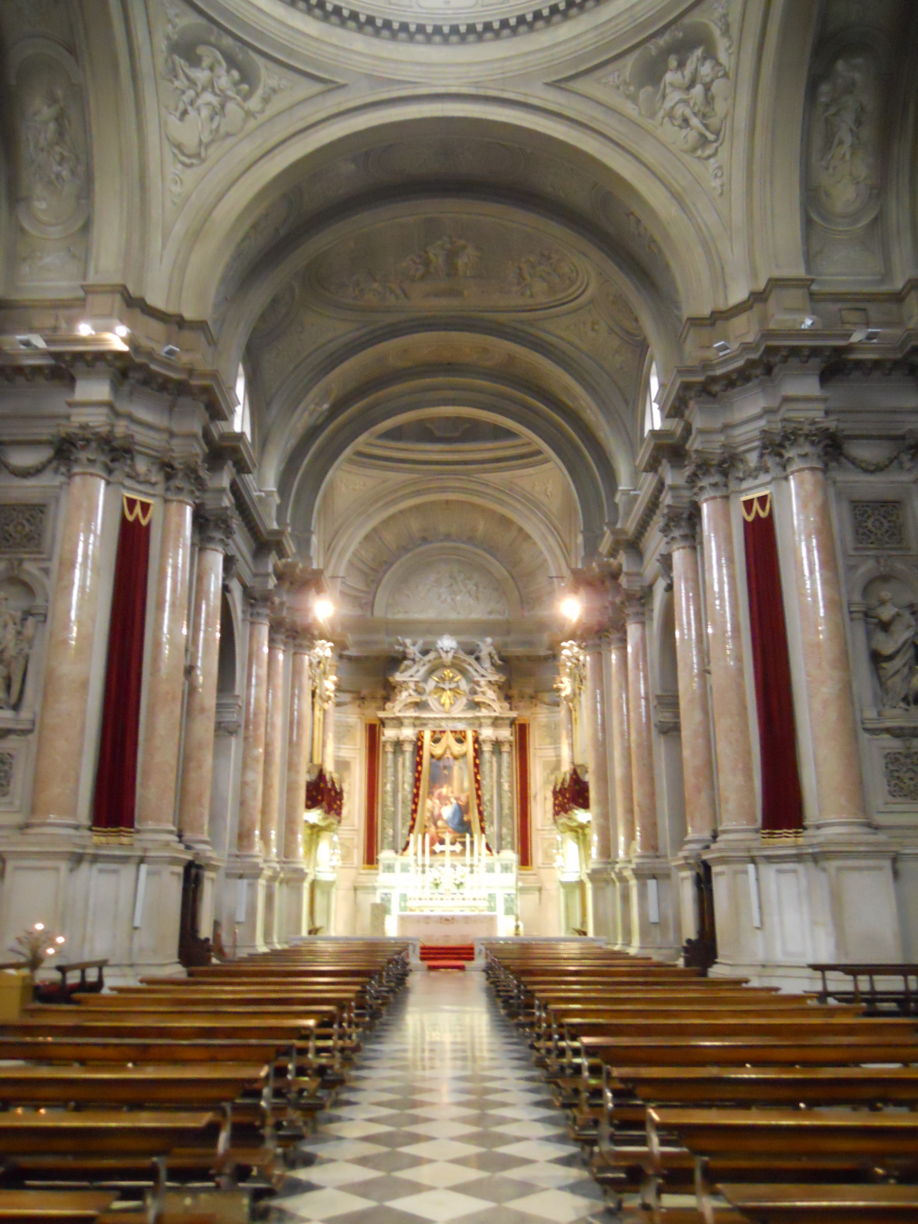 santa maria della pace (brescia) interno1.jpg